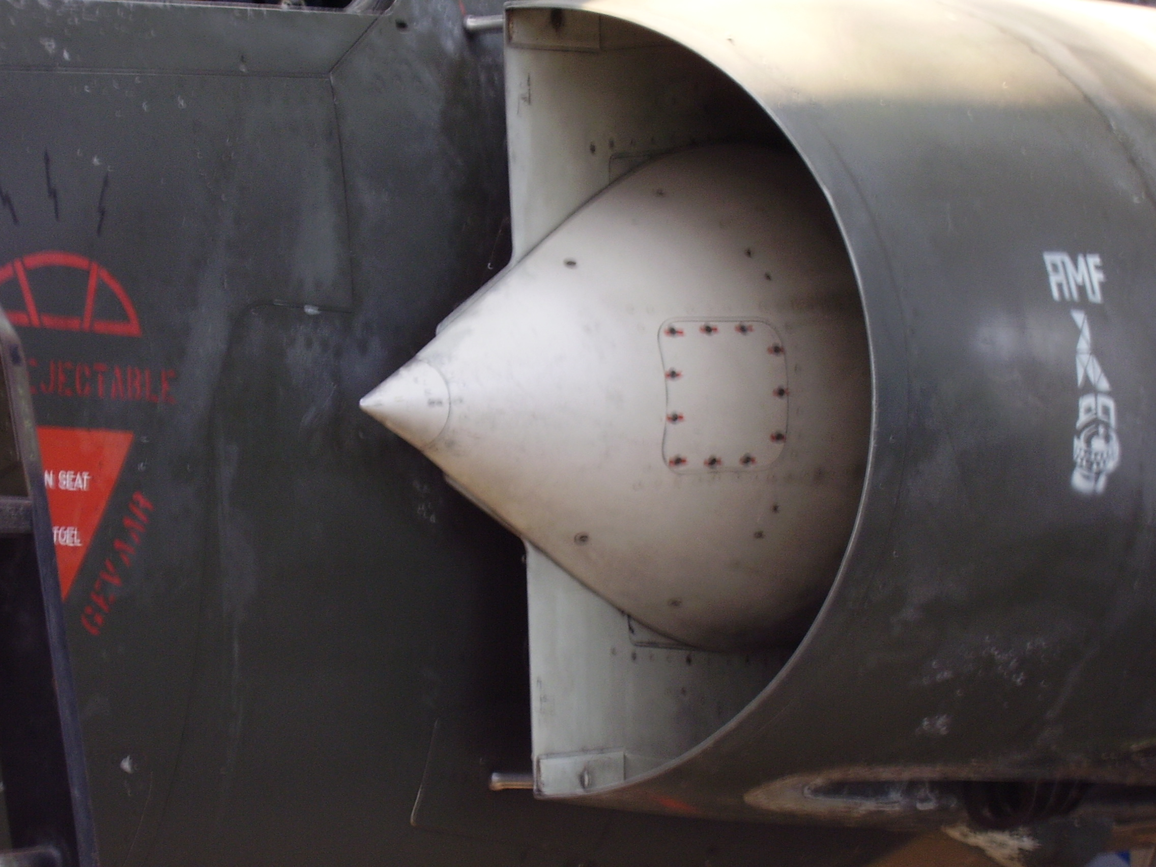 Royal Military Museum Brussels, Musée Royal de l'Armée, Koninklijk Museum van het Leger en de Krijgsgeschiedenis